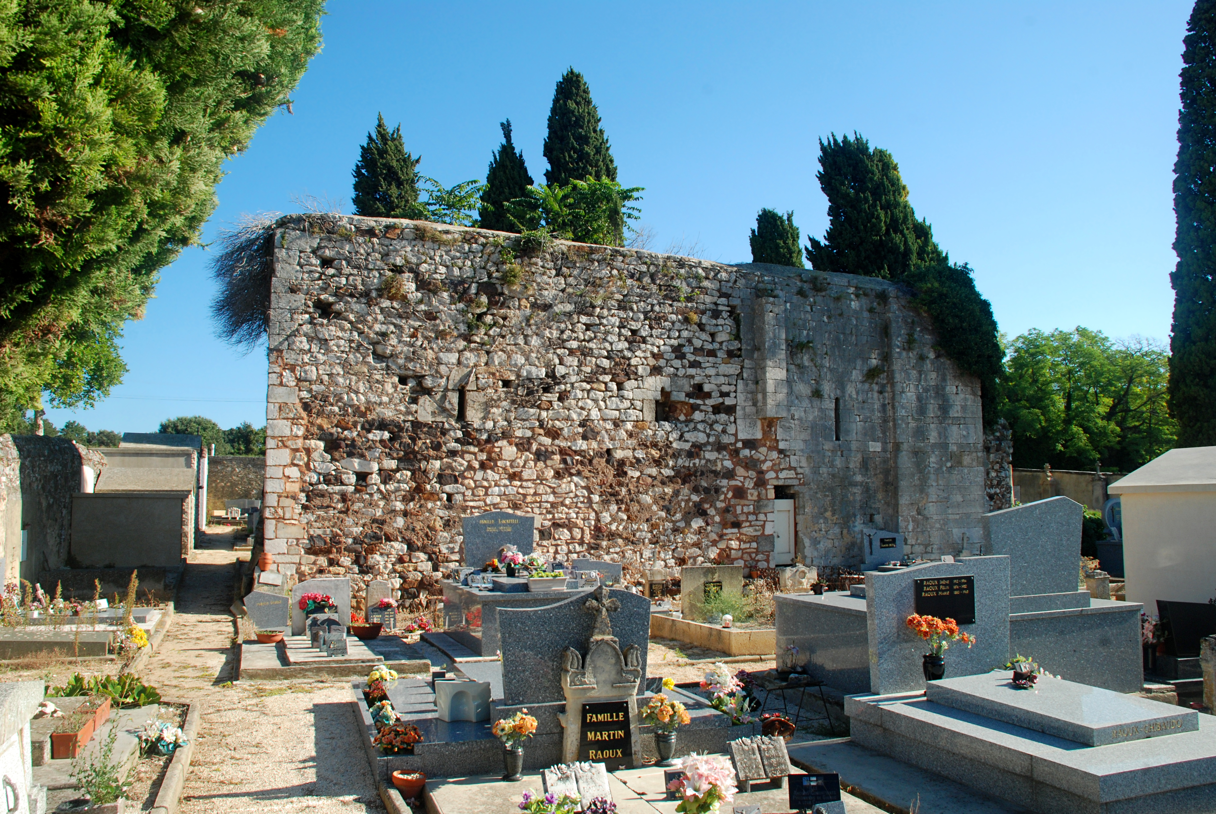 France - Gard - Chapelle Saint-Privat de Pouzilhac